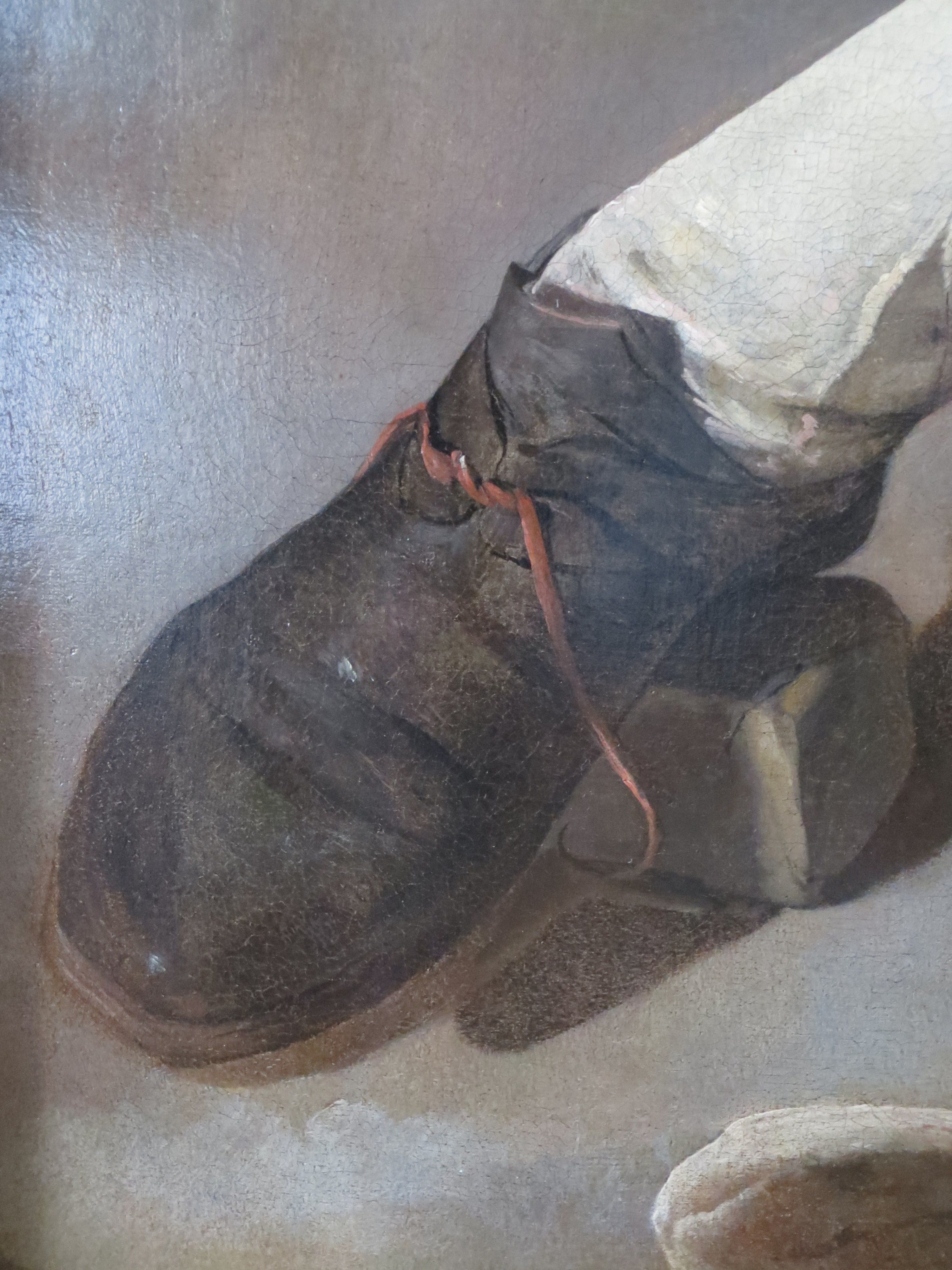 Georges de La Tour Le Vielleur détail du lacet défait